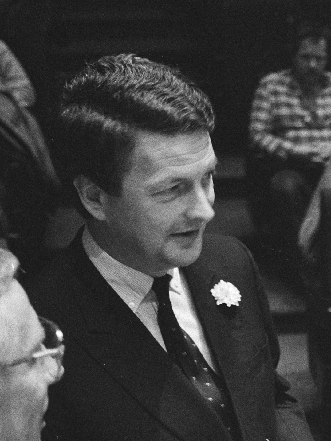 Kommer Damen tijdens massabijeenkomst personeel Wilton Fijenoord voor behoud werf. Datum 20 februari 1984